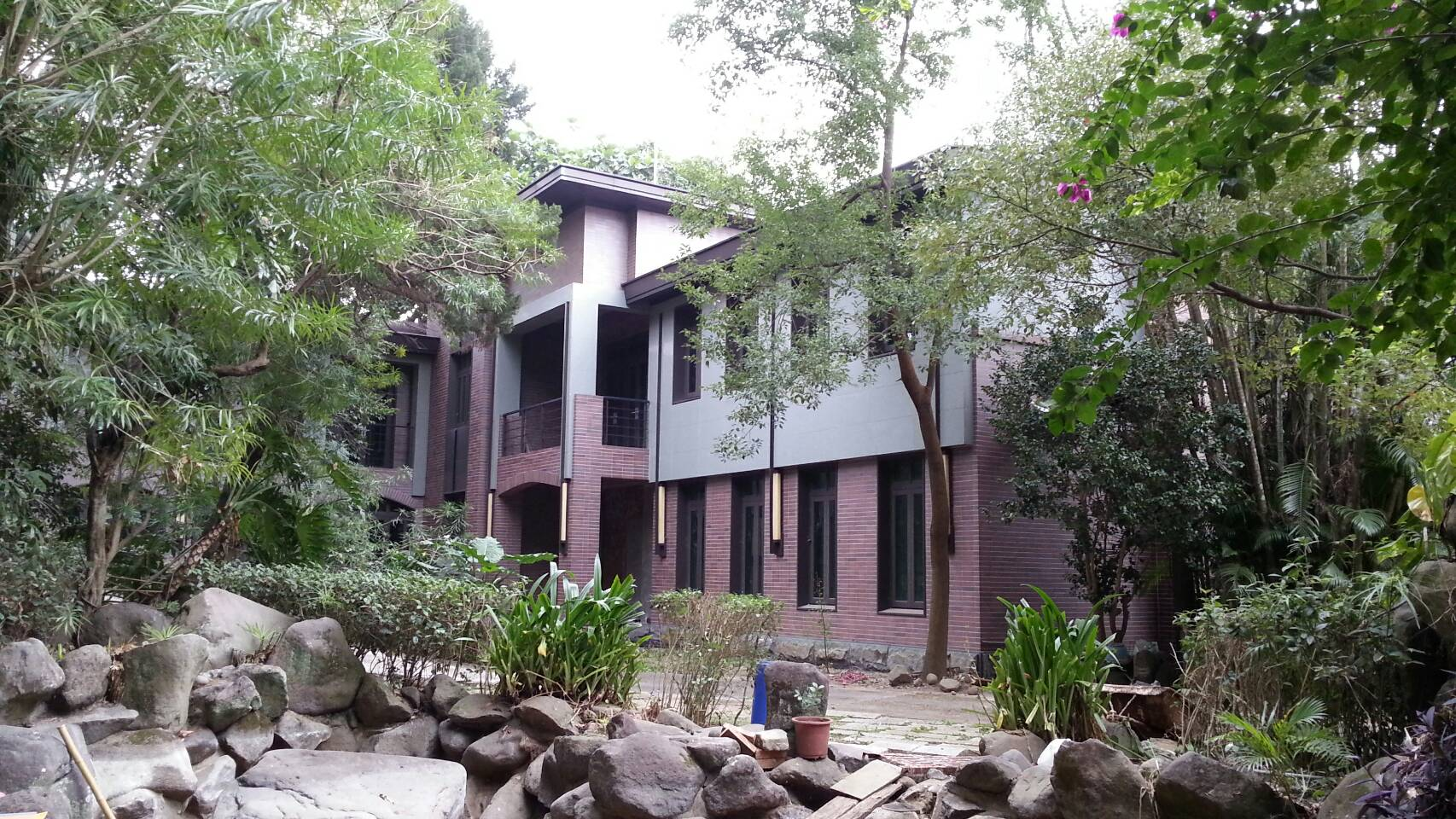 中文（台灣）: 張學良故居台北市復興三路70號，張學良一生居住最久的地方